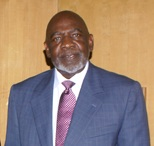 Cheick Modibo Diarra, astrofisico della NASA e Primo Ministro ad interim del Mali